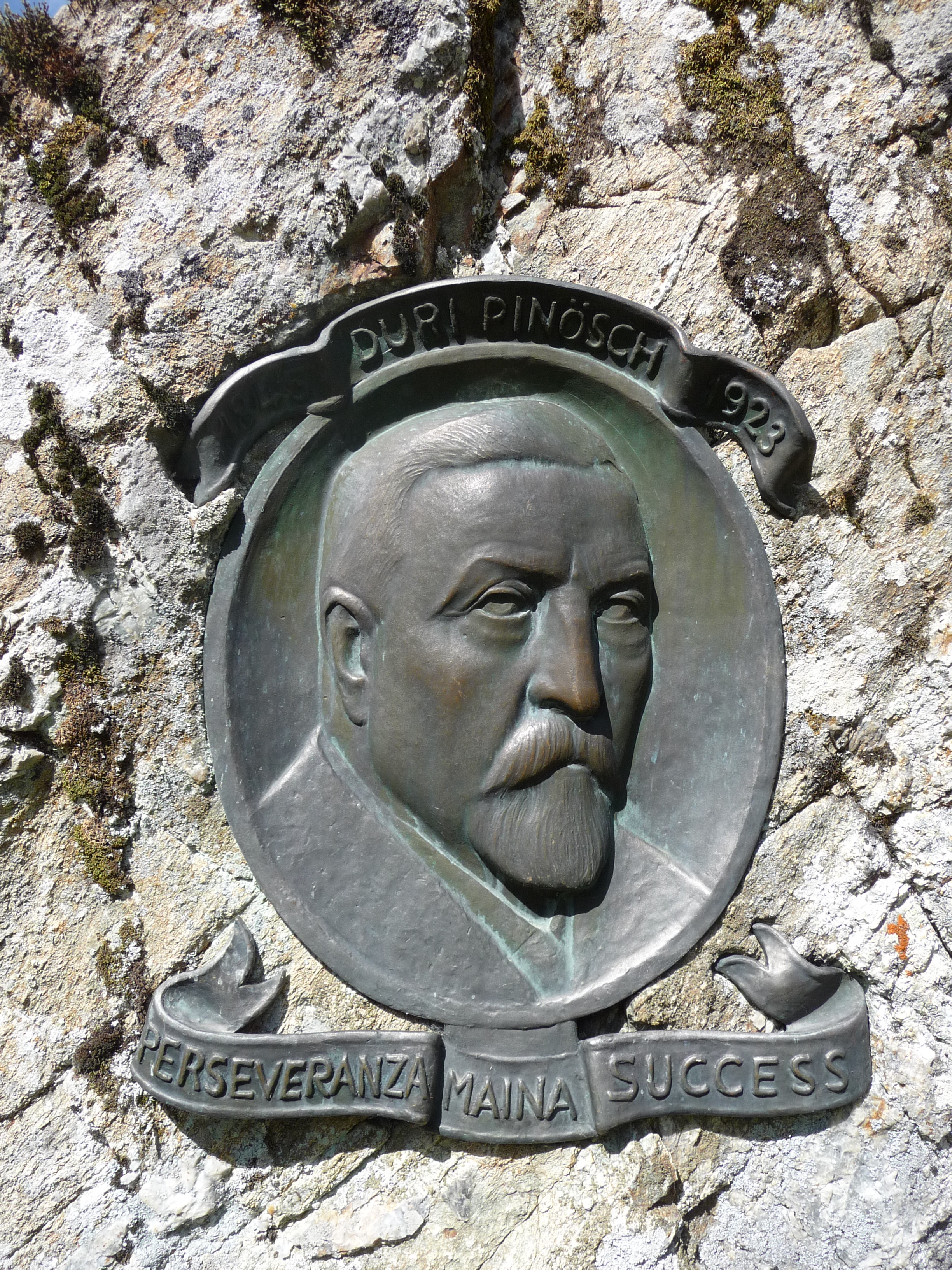 Gedenkstein des Hoteliers Duri Pinösch (geboren 1845 gestorben 1923) im Kurpark Vulpera.